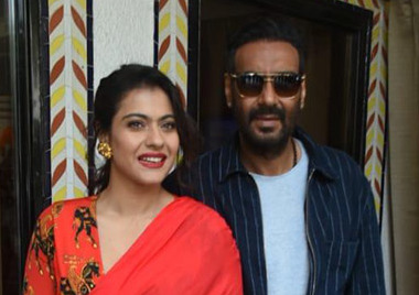 Kajol dan Ajay Devgn mempromosikan Tanhaji pada 5 Februari 2020